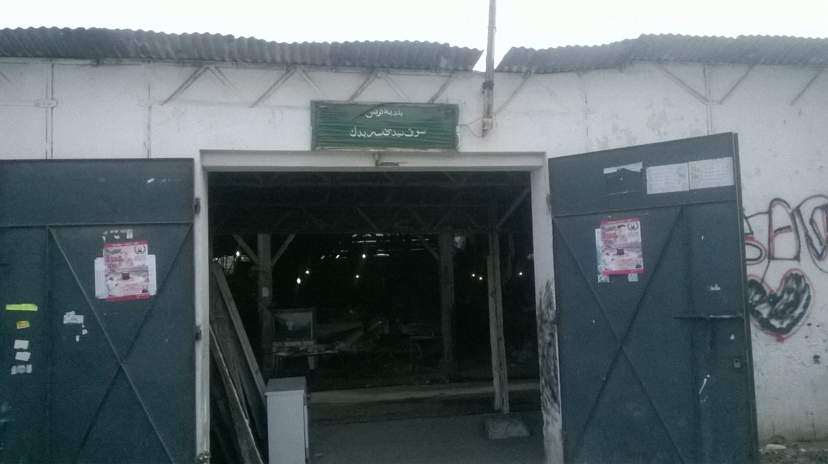 El Hafsia , Tunis الحفصية ، تونس